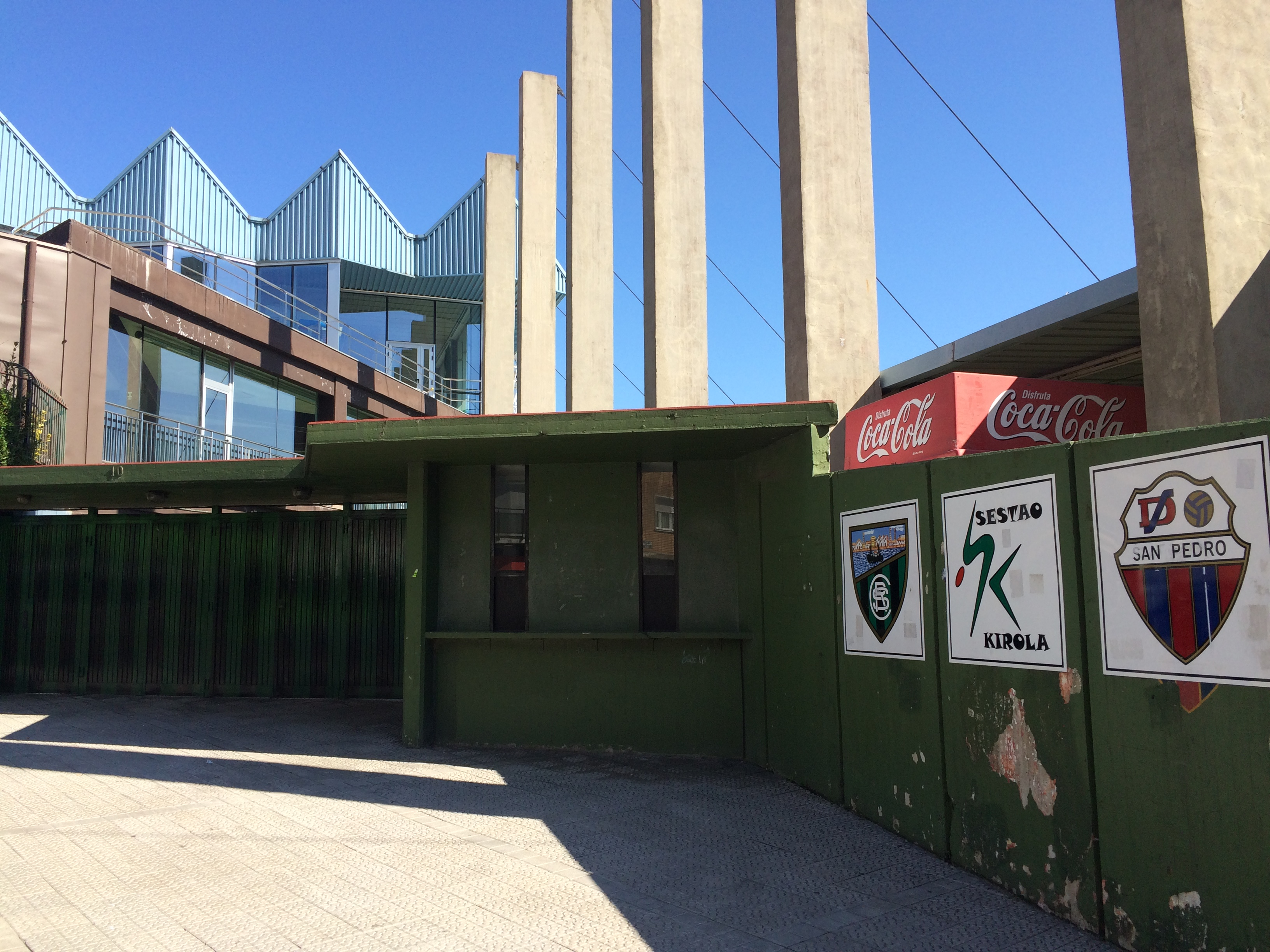 Entrada al Campo Municipal de Fútbol de Las Llanas en Sestao